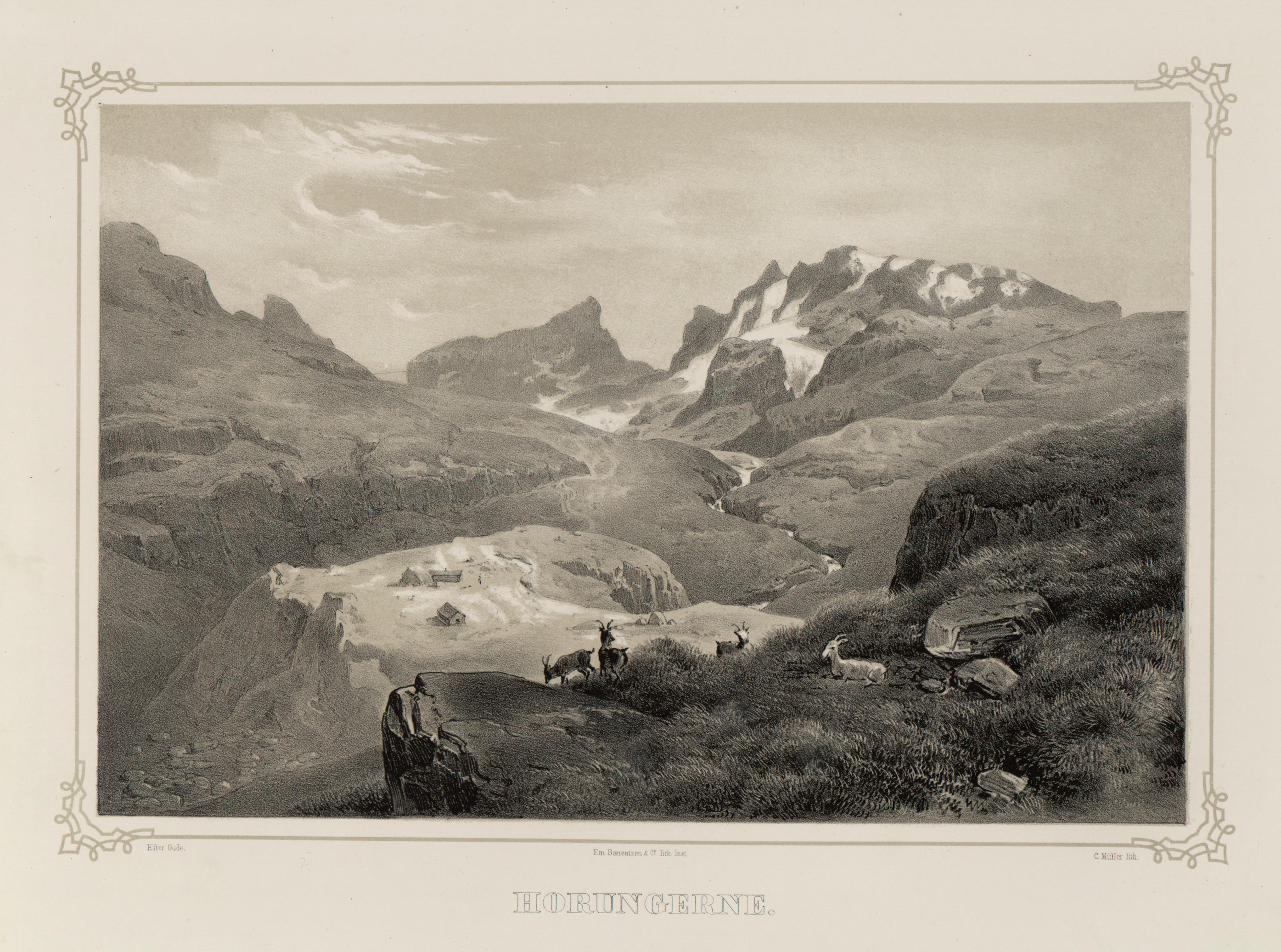 Hans Gude: Horungerne. Illustrasjon hentet fra boken "Norge fremstillet i Tegninger" av Asbjørnsen, P.Chr. og utgitt av Chr. Tønsberg (no, 1848)